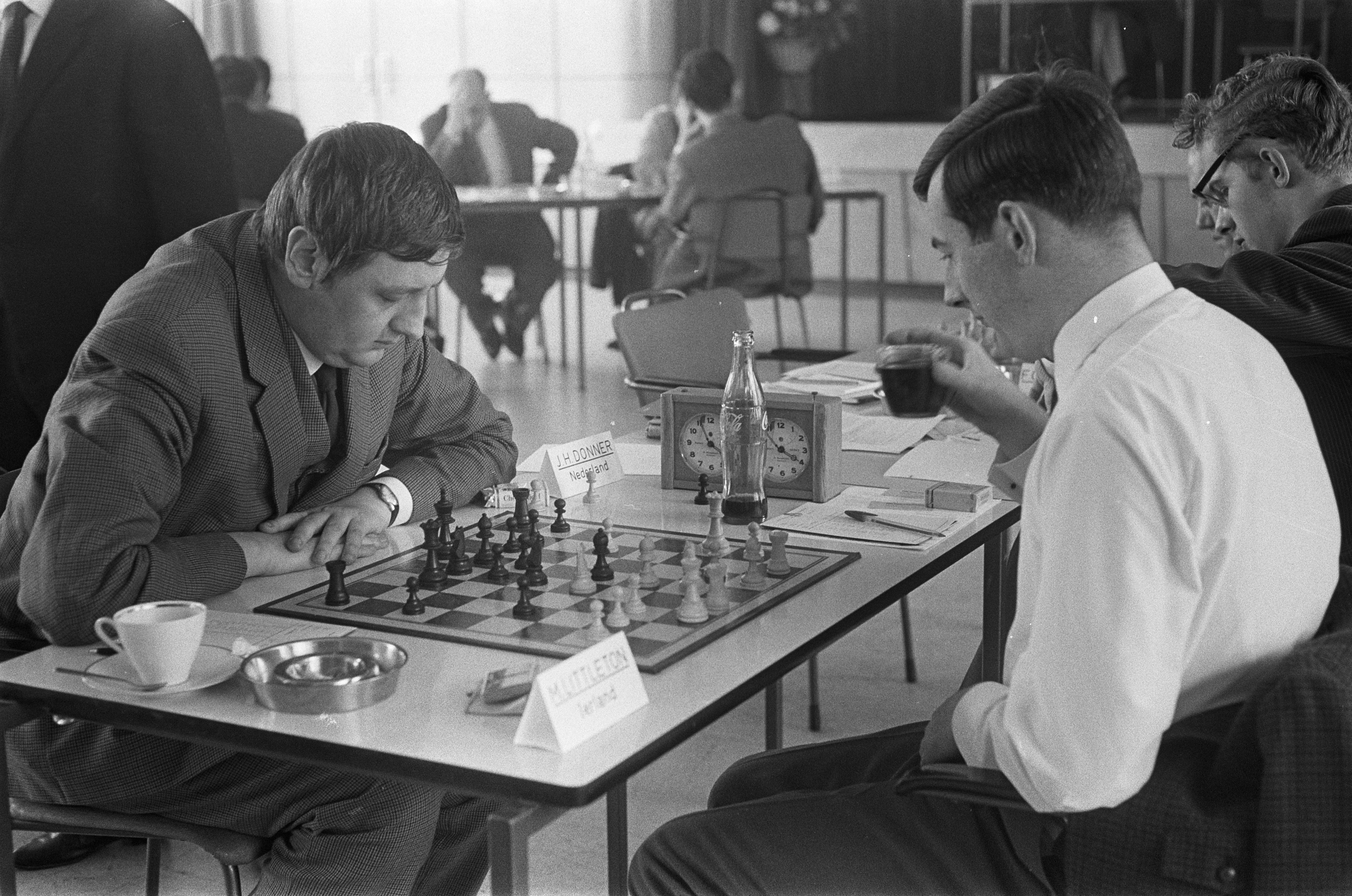 Collectie / Archief : Fotocollectie Anefo Reportage / Serie : Fédération Internationale des Échecs (FIDE) -Zone schaaktoernooi 1966 in de kantine van 'De Nederlanden van 1845' te Den Haag Beschrijving : Schaak grootmeesterJan Hein Donner aan het schaakbord vs. Michael Flannan Littleton Datum : 26 september 1966 Locatie : Den Haag, Zuid-Holland Trefwoorden : schaken, sport, toernooien Persoonsnaam : Donner, Jan Hein Fotograaf : Fotograaf Onbekend / Anefo Auteursrechthebbende : Nationaal Archief Materiaalsoort : Negatief (zwart/wit) Nummer archiefinventaris : bekijk toegang 2.24.01.05 Bestanddeelnummer : 919-6014